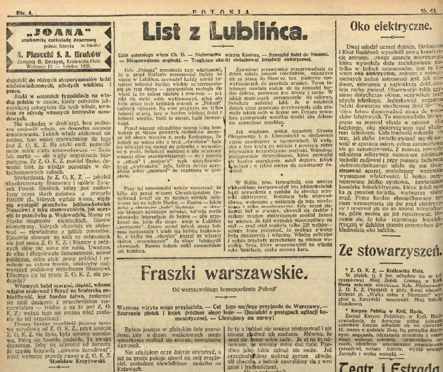 Stanisław Krzyżowski, Słowa prawdy o ZOKZ, „Polonia” z 4 marca 1926, nr 63, s. 4